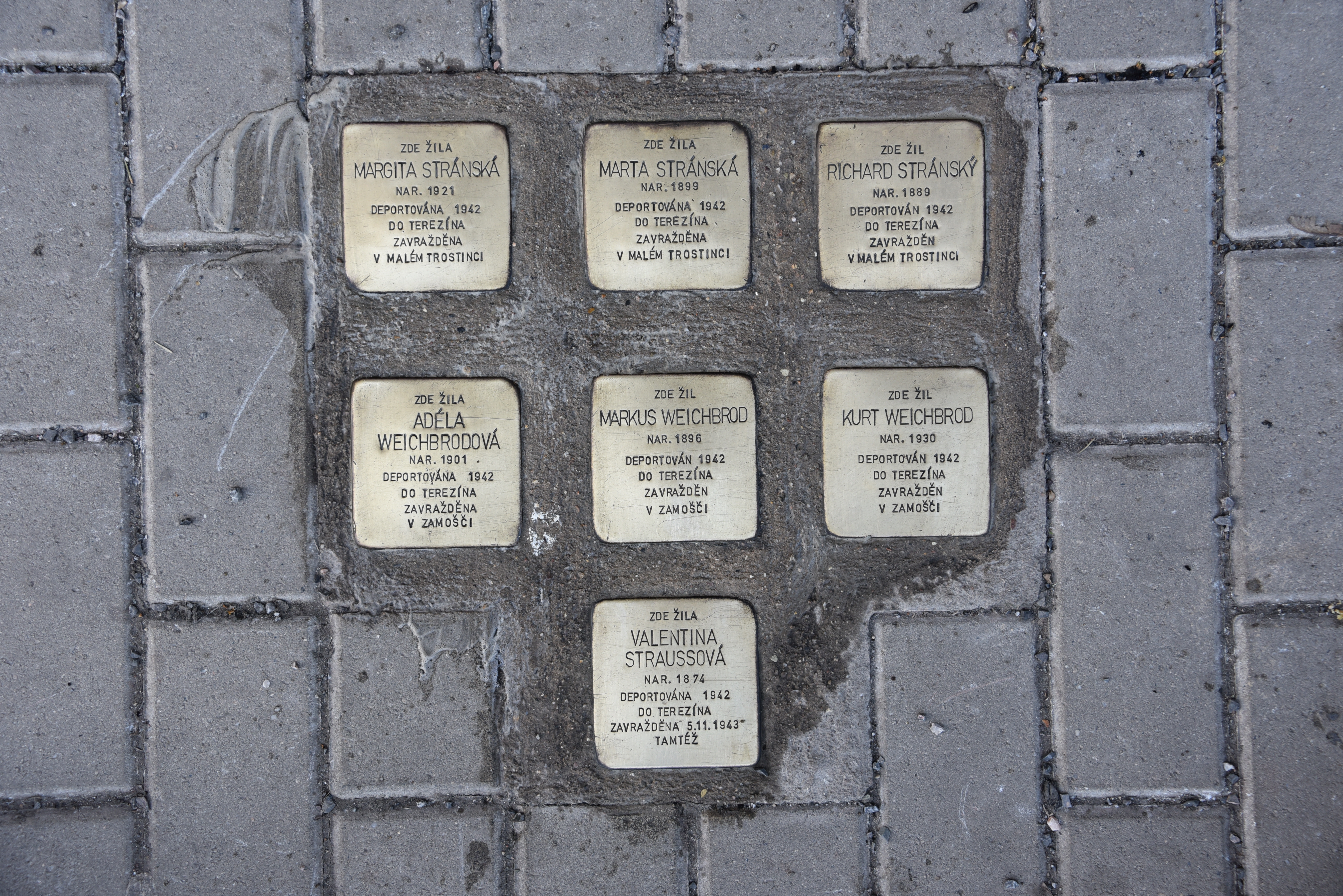 Stolpersteine für die Familien Weichbrod, Stranska und Strauss, Petrohradská 155/27.